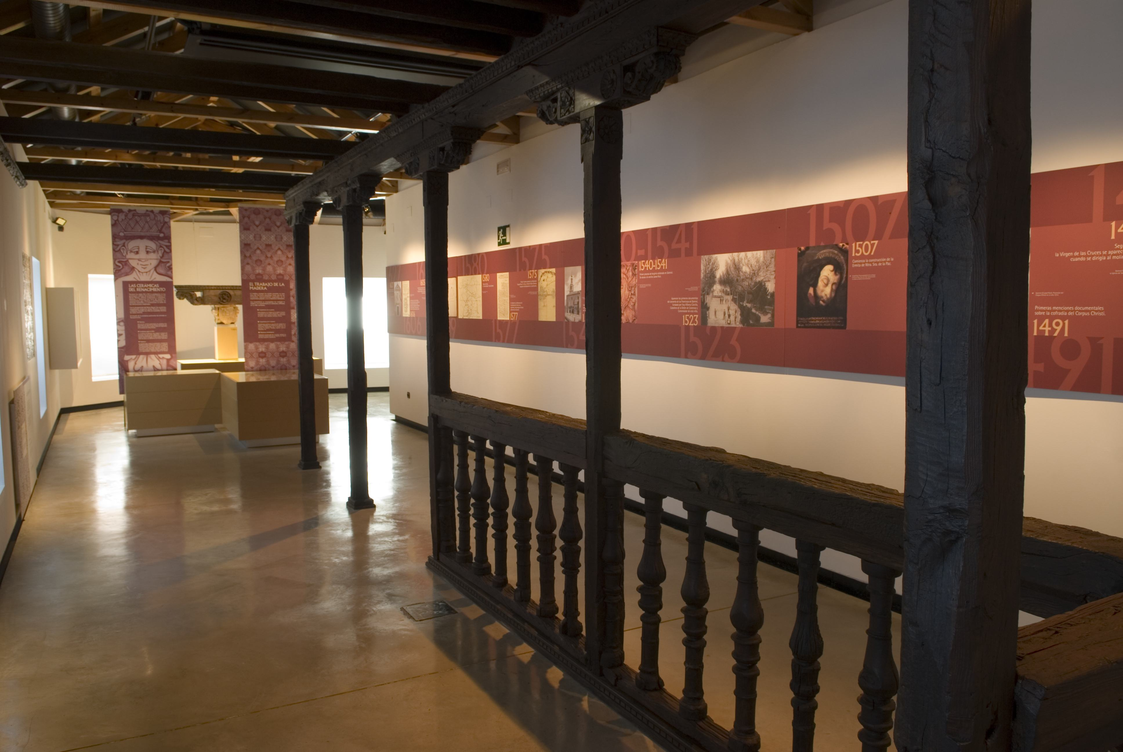 Galeria renacentista de tradición mudejar del S. XVI